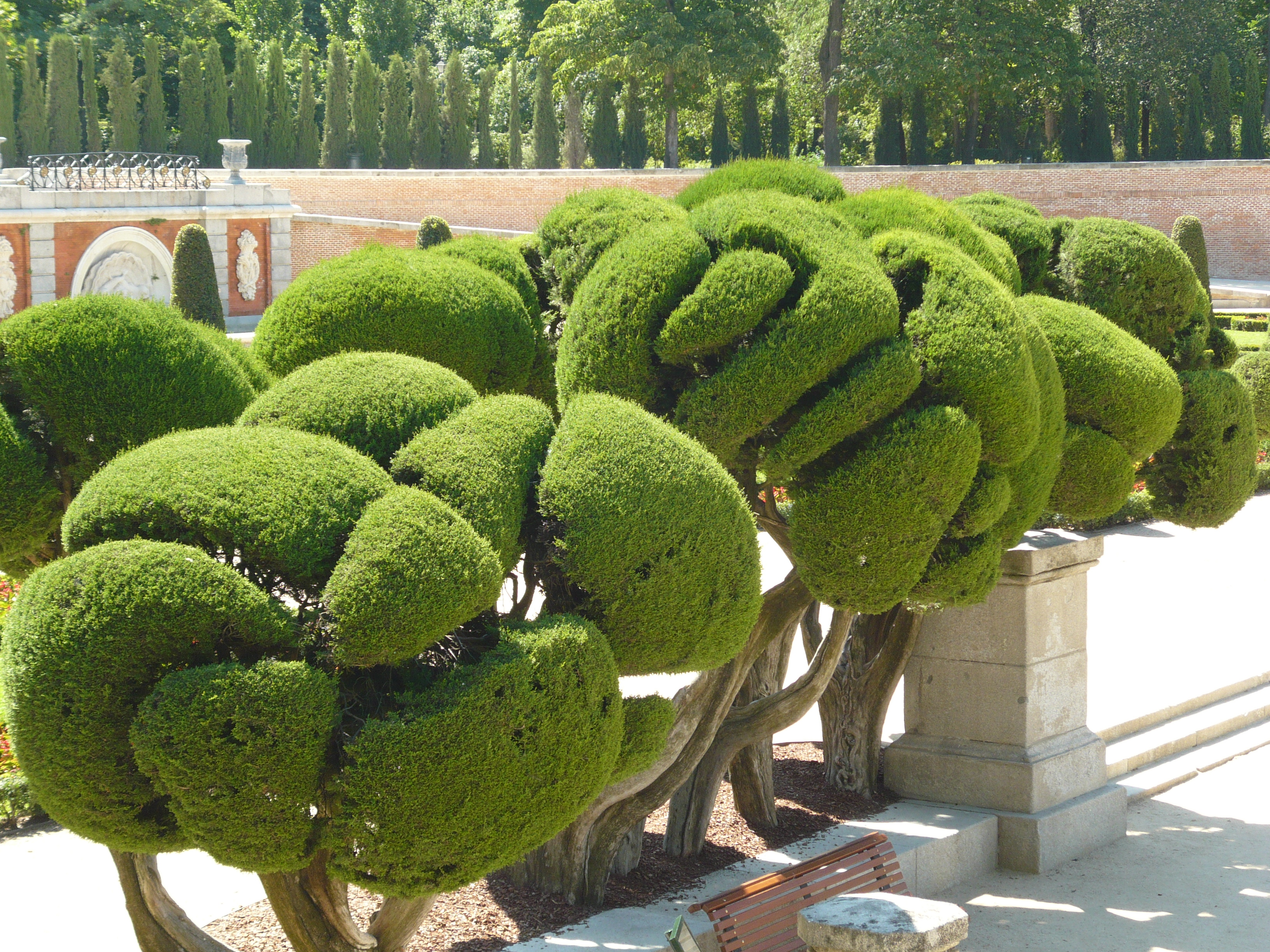 Cupressus topiary, El Parterre, Parque del Retiro, Madrid, España.